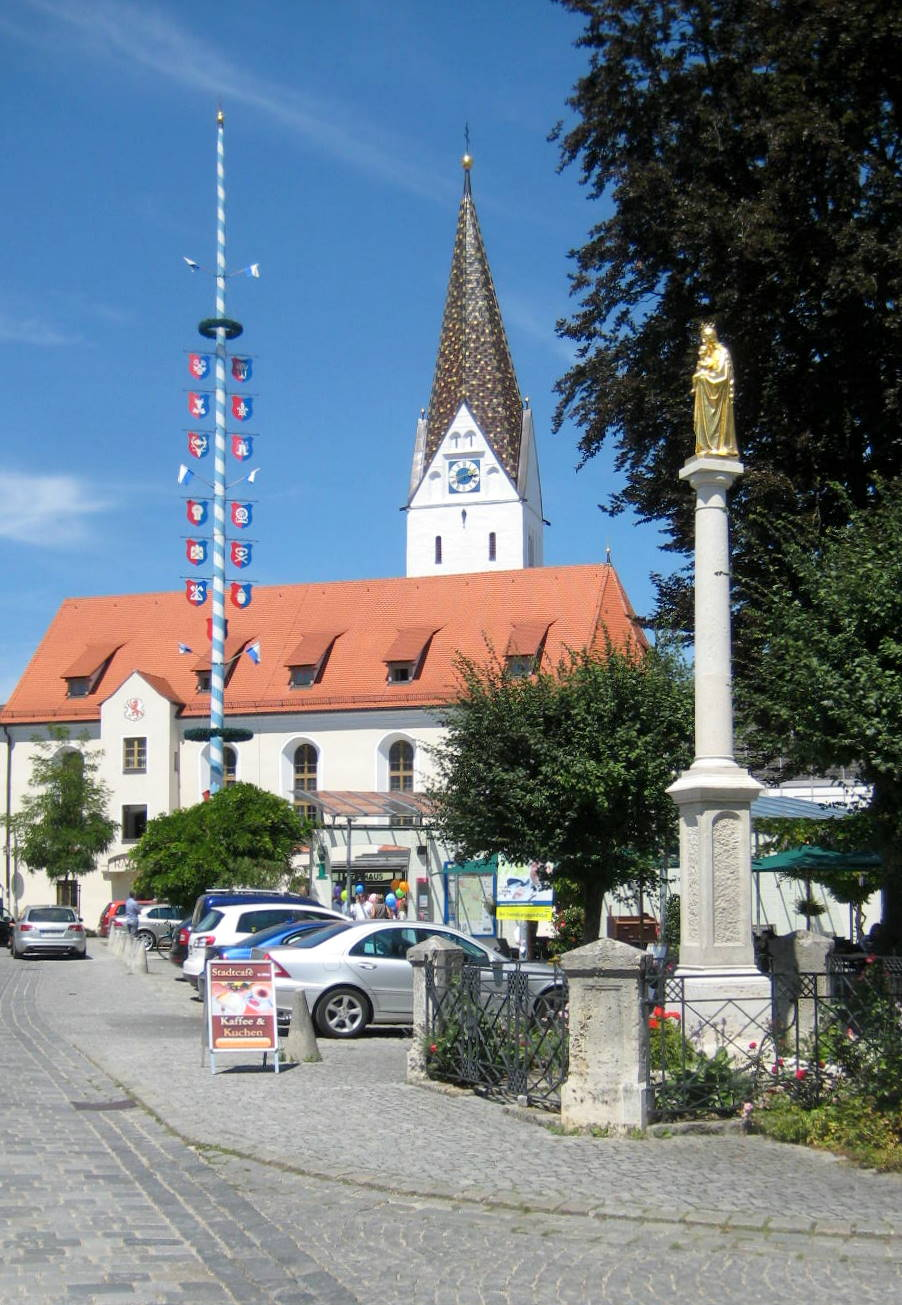 Vohburg an der Donau ist eine Gemeinde im Landkreis Pfaffenhofen a.d. Ilm.